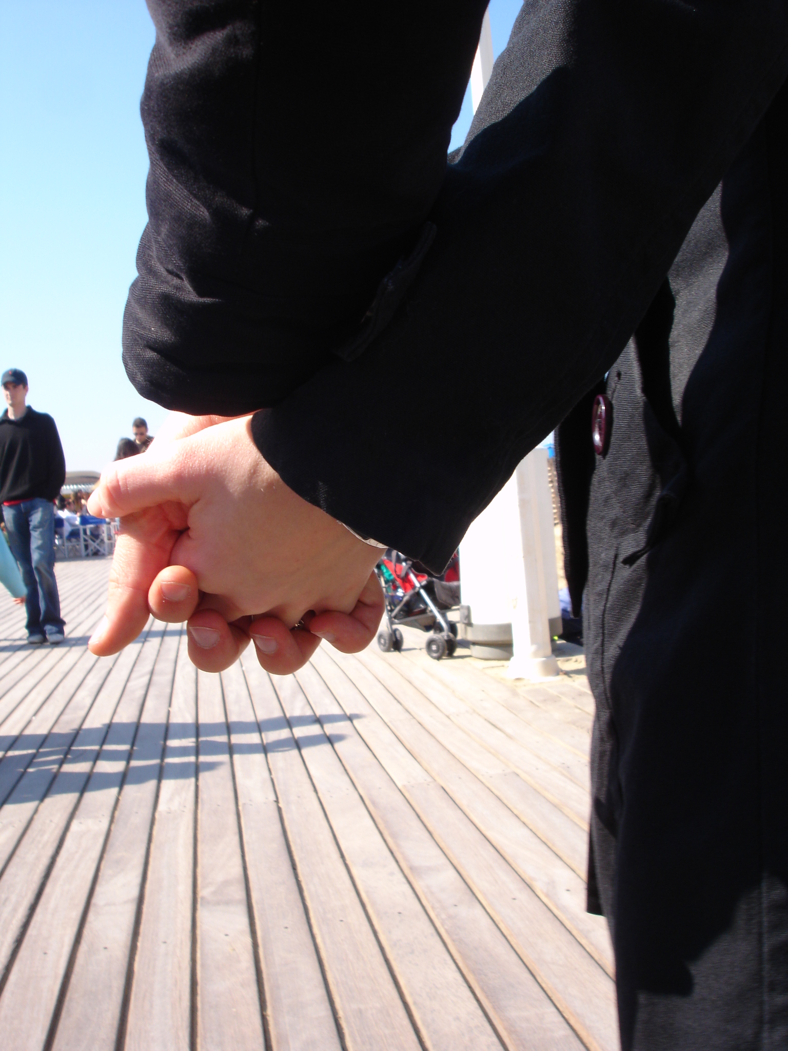 France, Calvados (14) , Deauville, plage